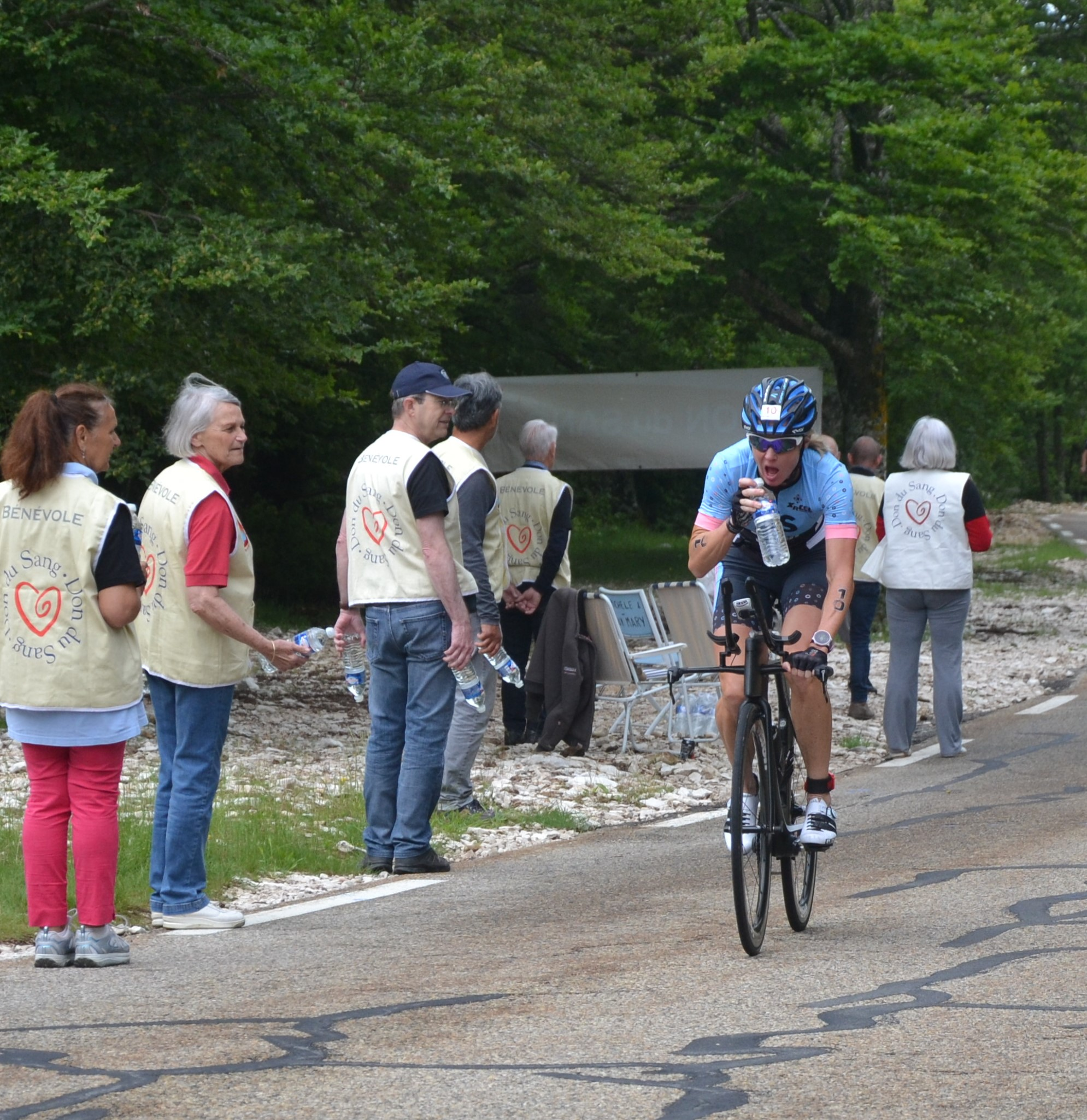 Sur les pentes du Mont Ventoux, au ravito "eau", à 10 km du sommet